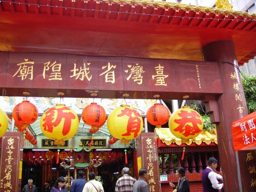 中文（台灣）: 臺灣省城隍廟大門賀歲燈籠。